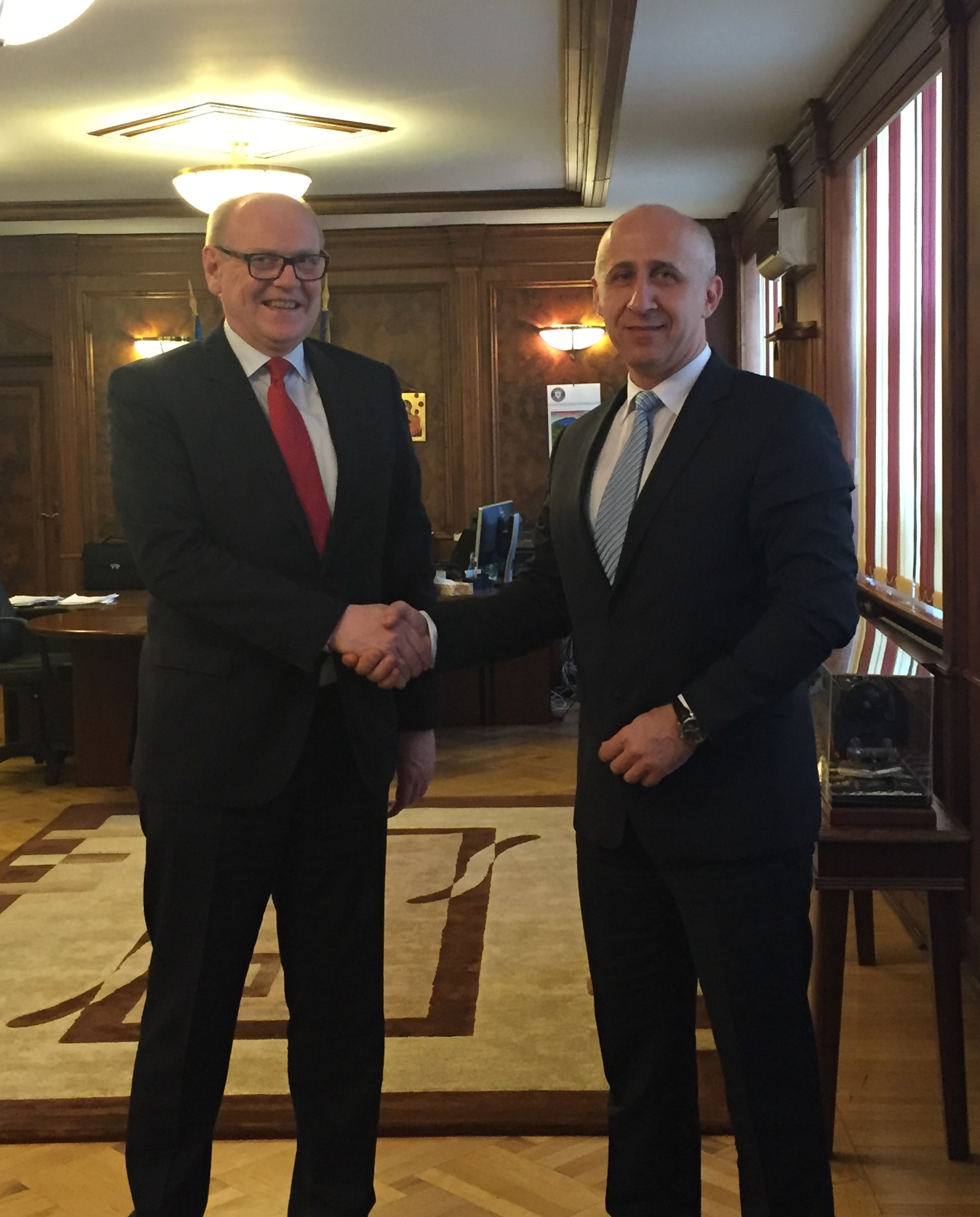 Cu Josef Doppelbauer, Directorul General al Agenției Feroviare Europene - ERA, la București, cu ocazia semnării acordului cu AFER